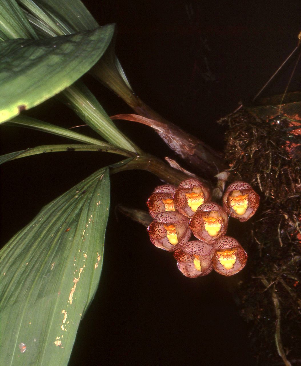 Peristeria pendula